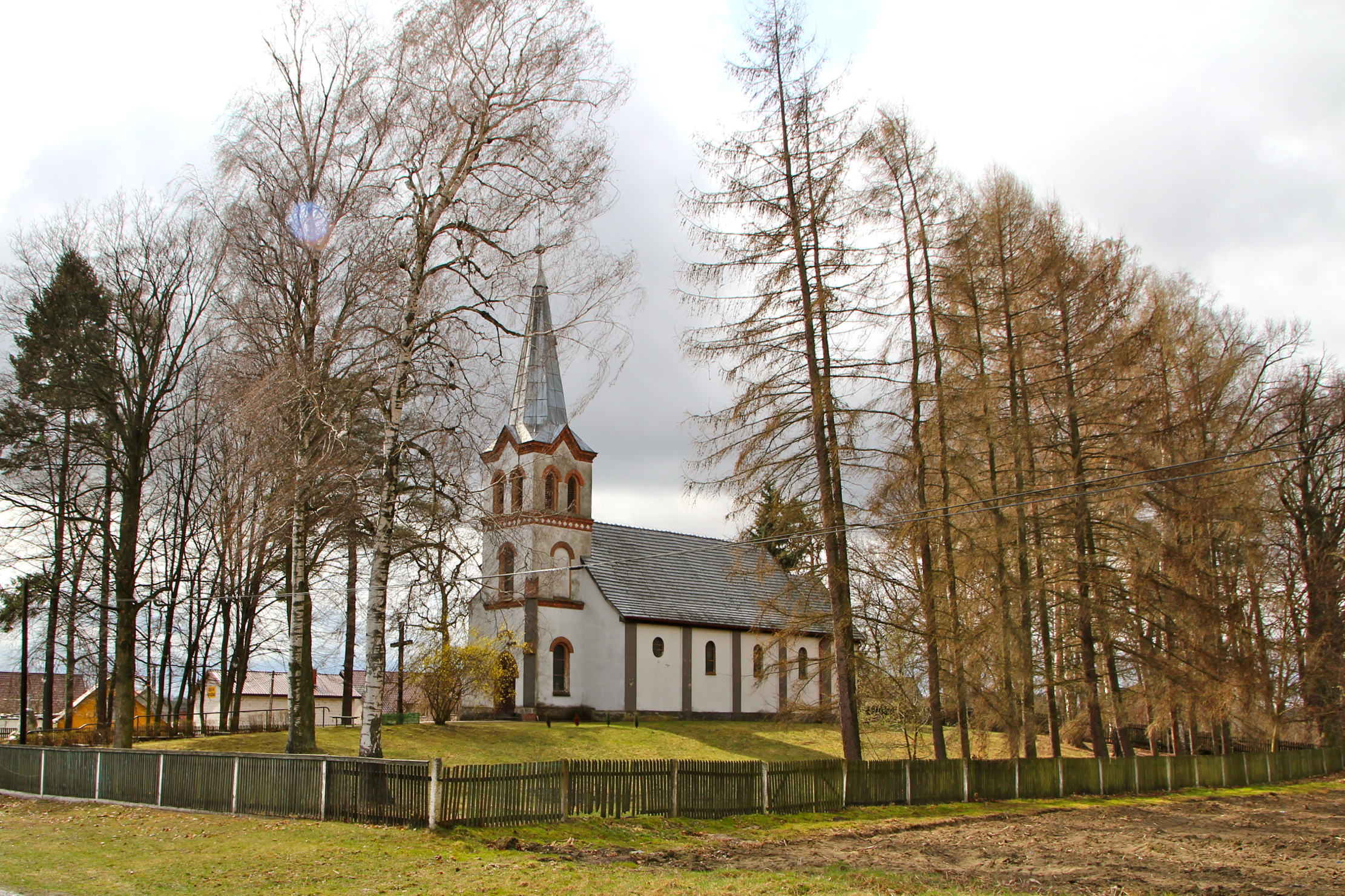 Jastrzębie (niem. Nassadel) - kościół filialny p.w. św. Wawrzyńca (zabytek nr 1104/66 z 04.02.1966).